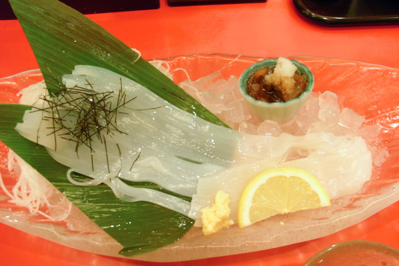 新千歳空港内の郷土料理屋で食べたヤリイカのイカソーメン。まあ、値段なりか。まあまあおいしいのだが、しゃきしゃきした感じはないか。